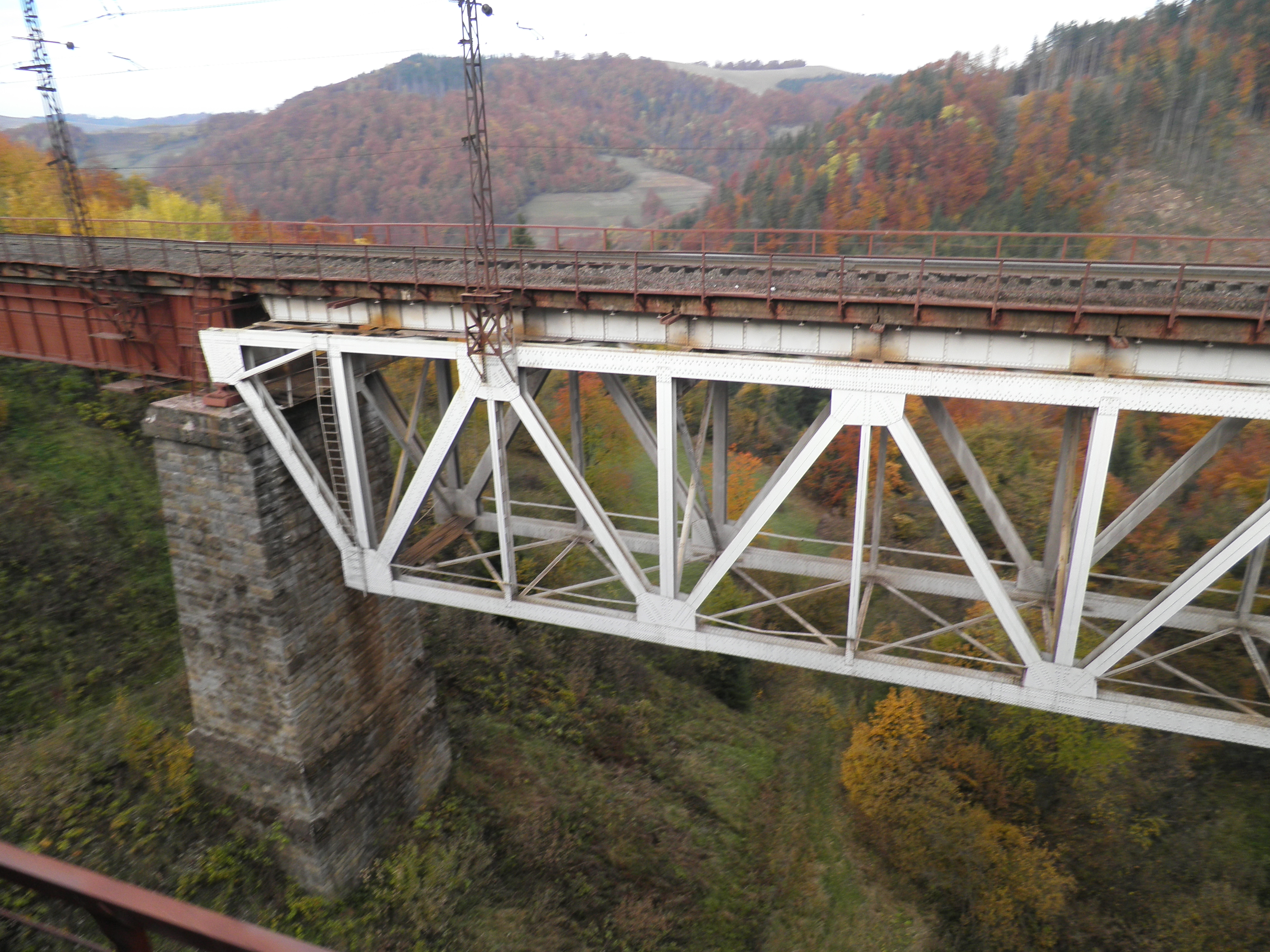 Железнодорожный мост возле Воловецкого перевала. Снимал я сам сегодня, 30/10/2011 г.